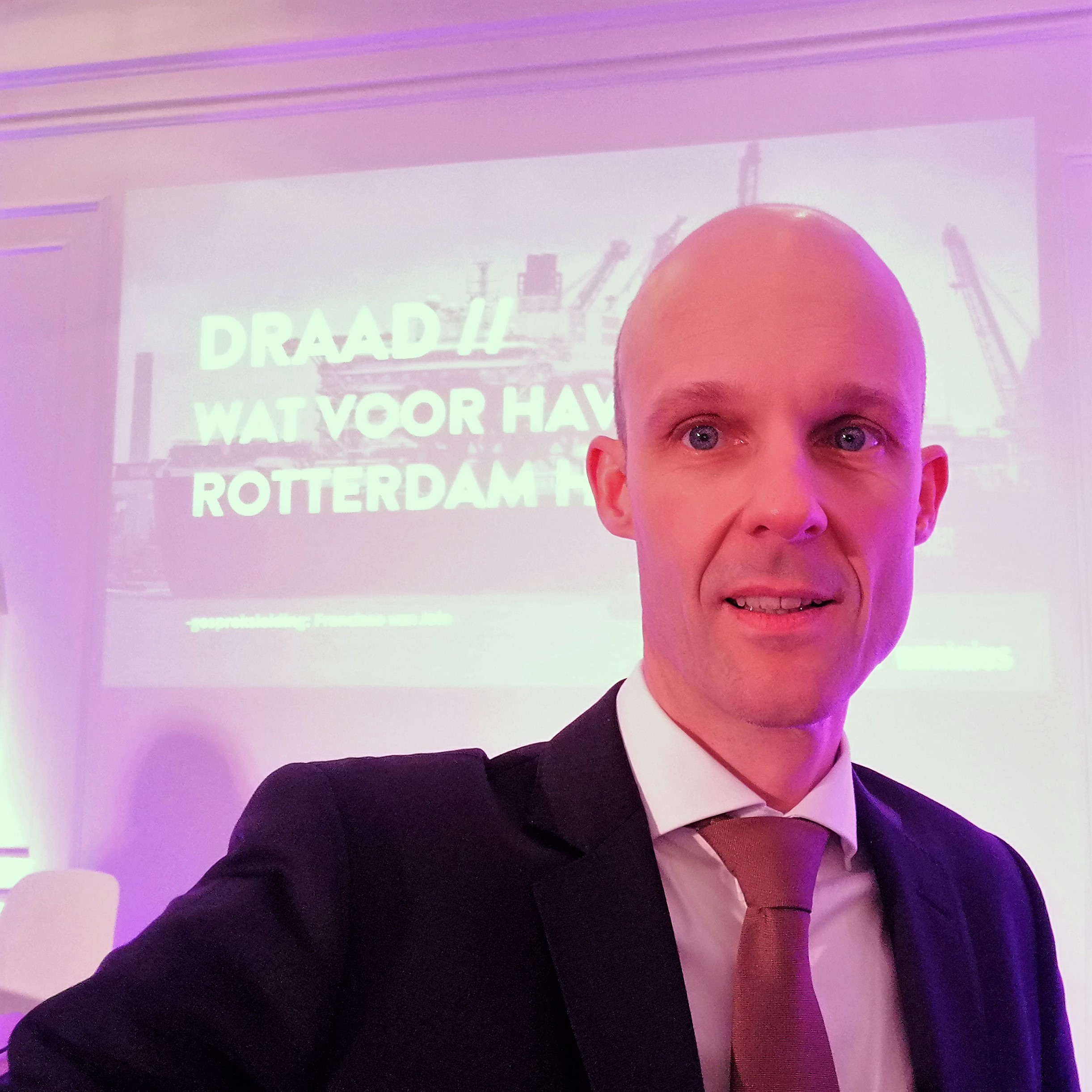 Maurice Meeuwissen